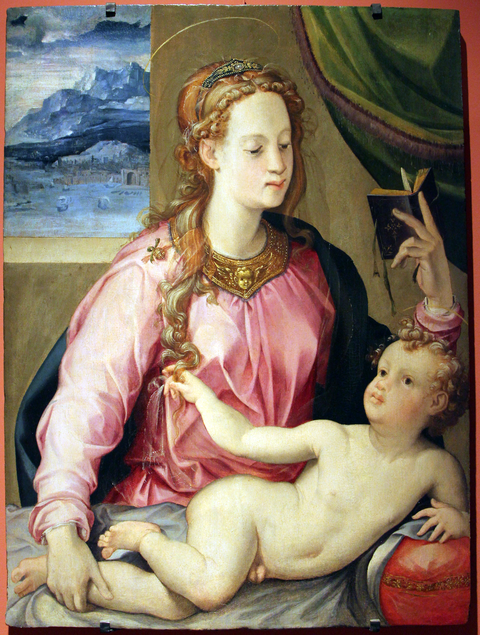 Museo civico (Prato) This is a photo of a monument which is part of cultural heritage of Italy.